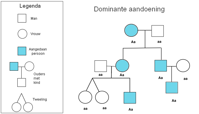 Schema van een dominante genetische afwijking in een familie, gemaakt aan de hand van het schema op de engelstalige wikipedia.